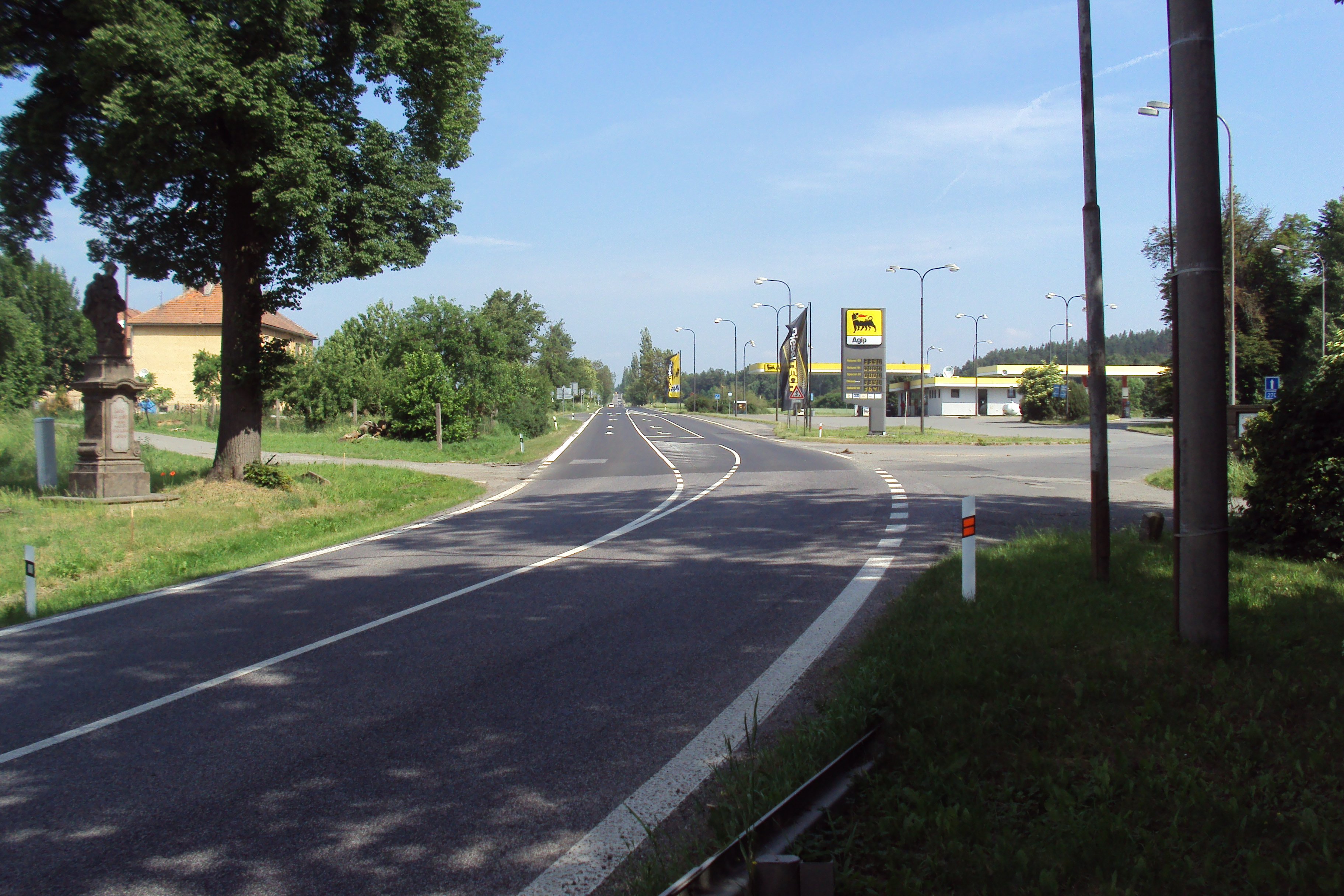 Výpadovka u Nového Berštejna v Dubé směr Česká Lípa